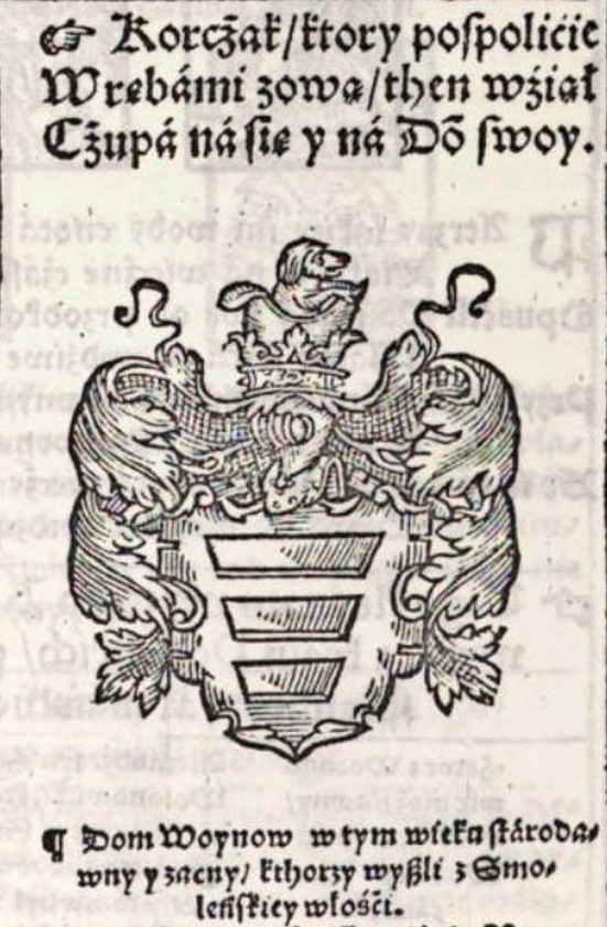 Герб Корчак (Вребы) в книге B. Paprockiego "Gniazdo cnoty...". Kraków: 1578, s. 1181